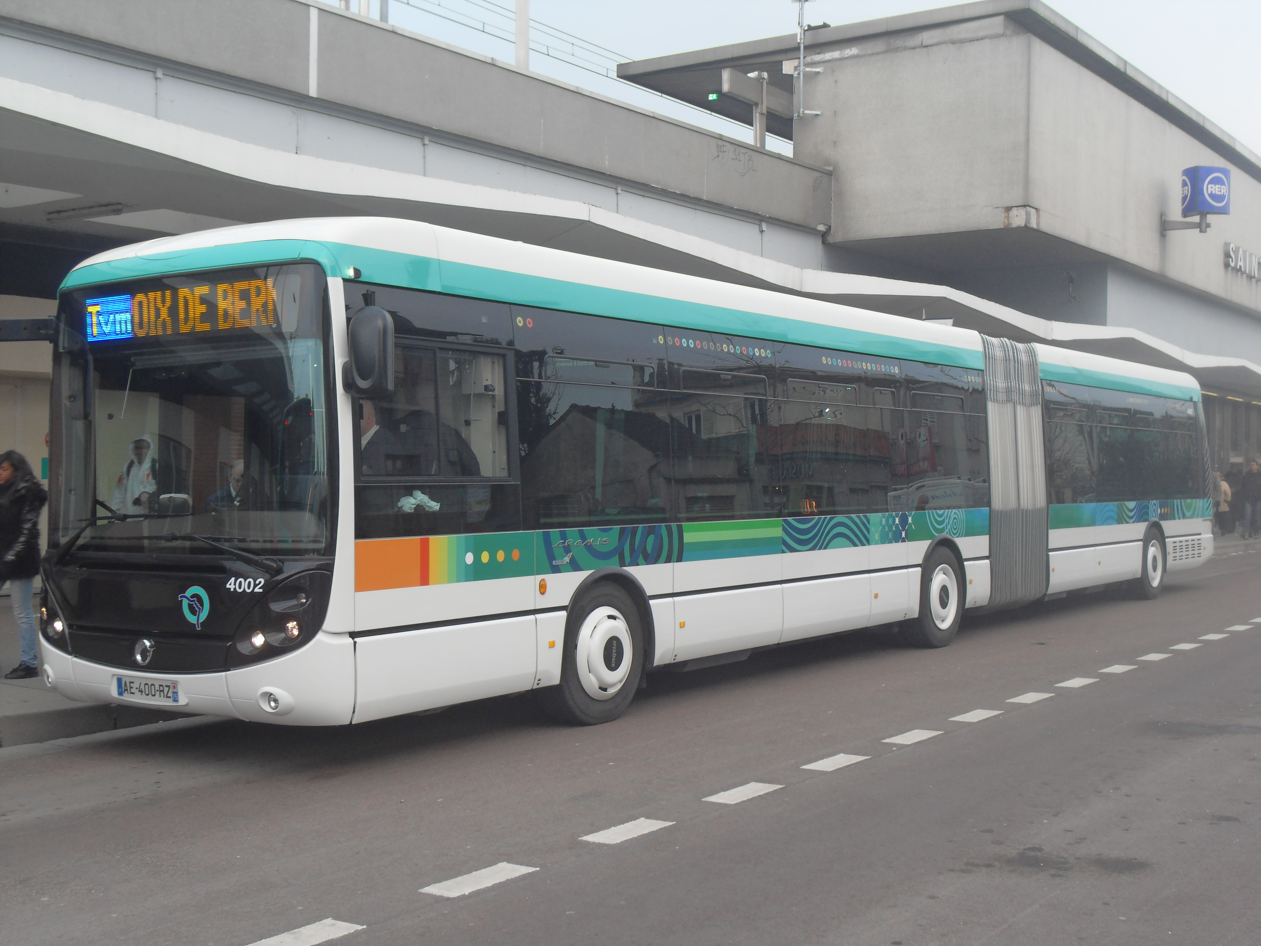 Le Créalis n°4002 assure le Tvm en direction de La Croix de Berny à la gare de Saint-Maur - Créteil.